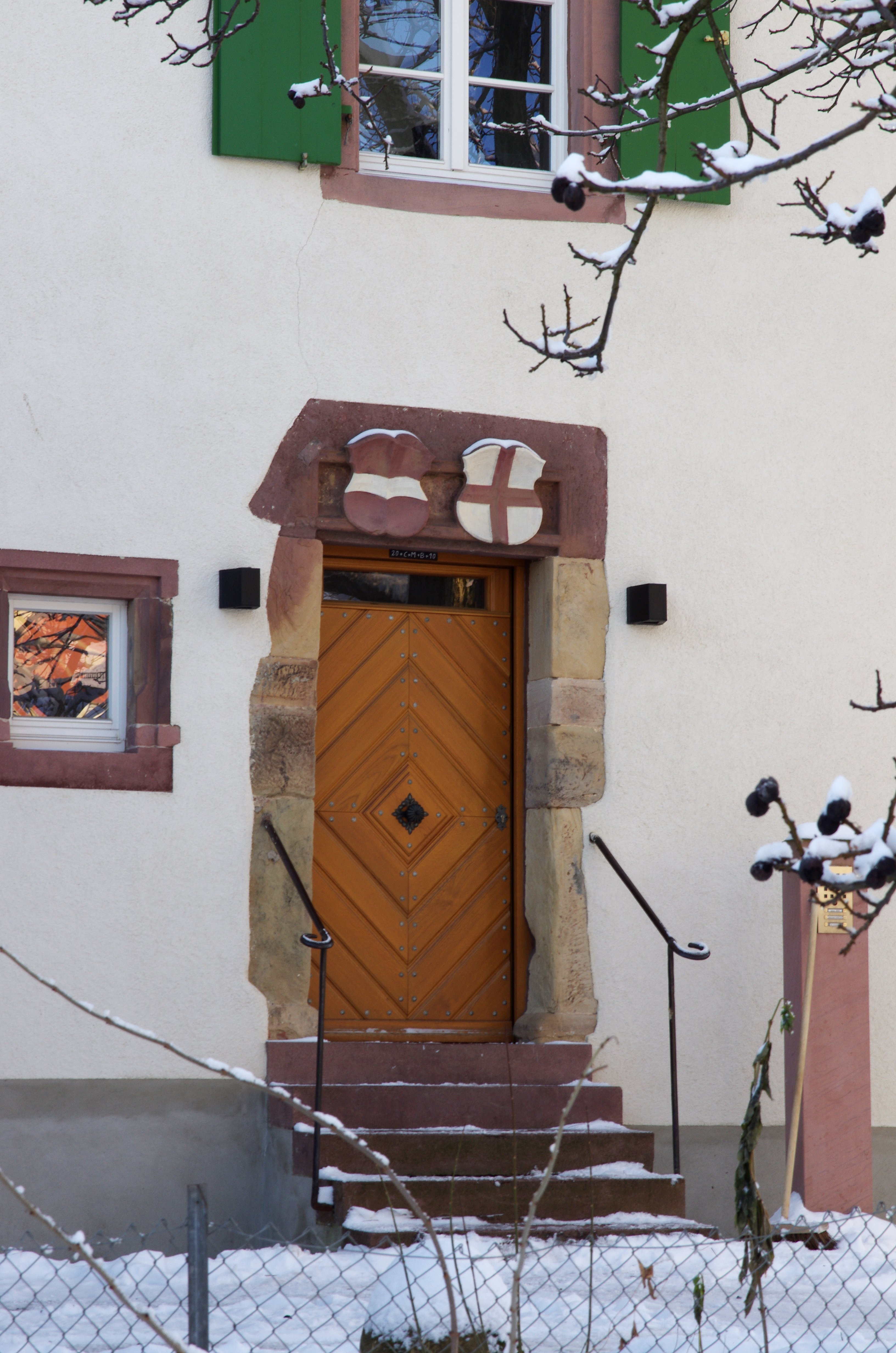 Die Eingangstür des alten Schloßes mit den Bandenschilden Österreichs (links) und Freiburgs (rechts)